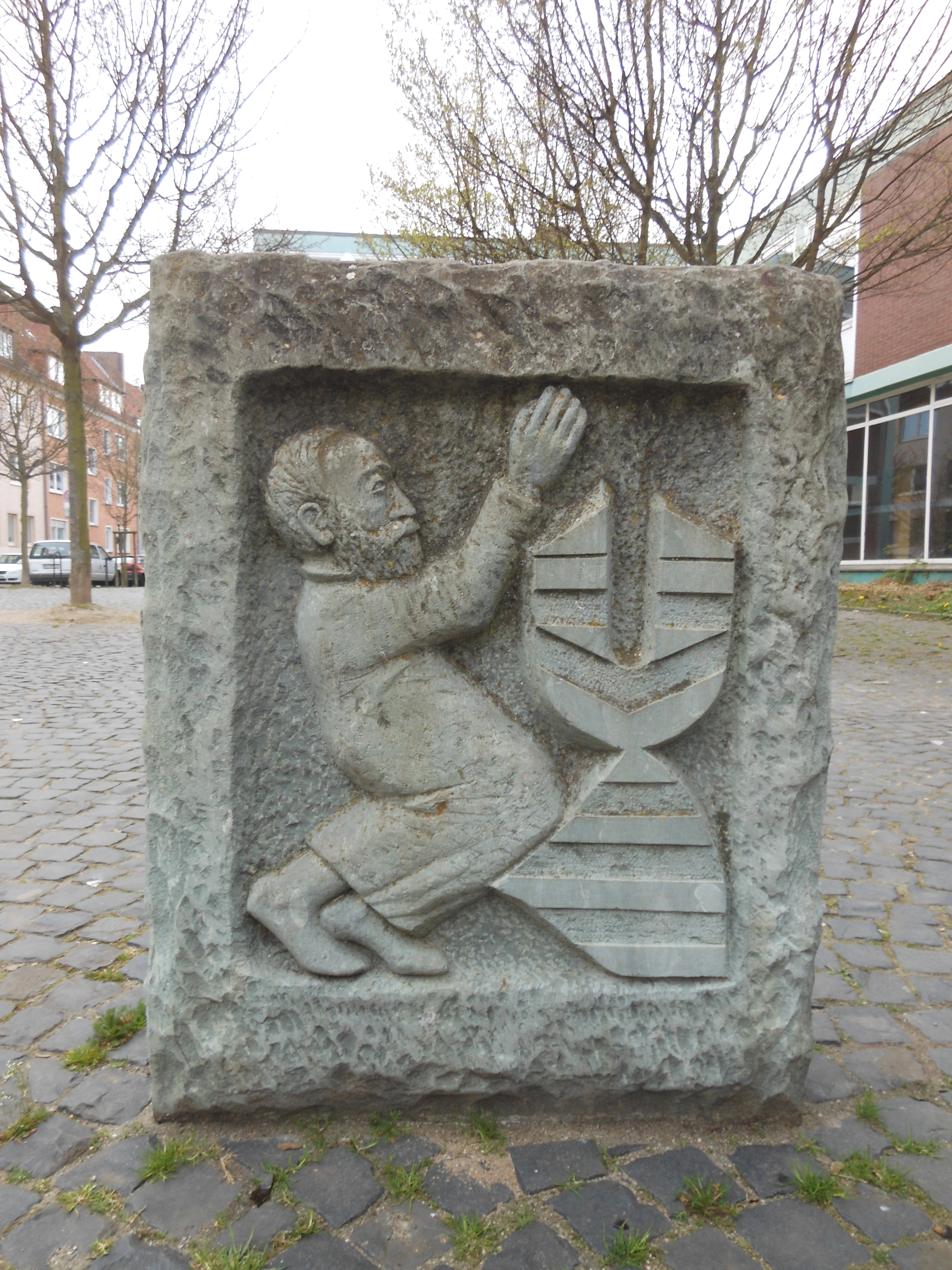 nachgebildeter Sockel des ehemaligen Schauteufelskreuzes am alten Markt in Hildesheim